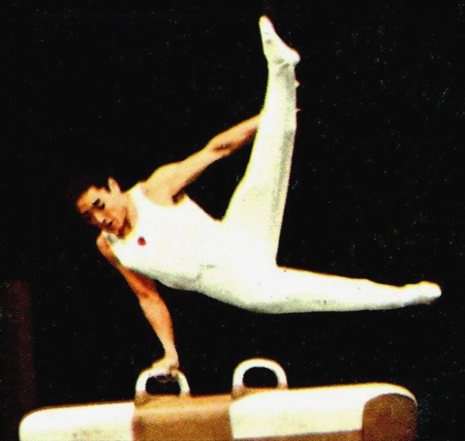 MUNCHEN 72 - Figurina-Stickers - Panini - N° 225 - KENMOTSU -GIA